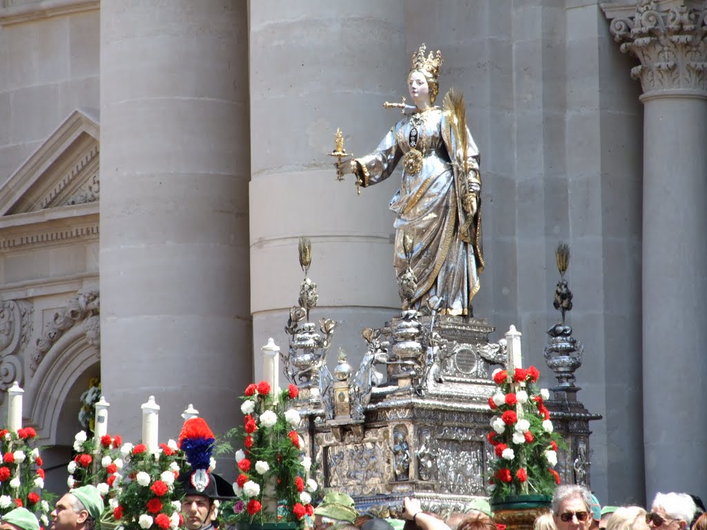 La Statua di Santa Lucia durante la festa religiosa della santa patrona siracusana.